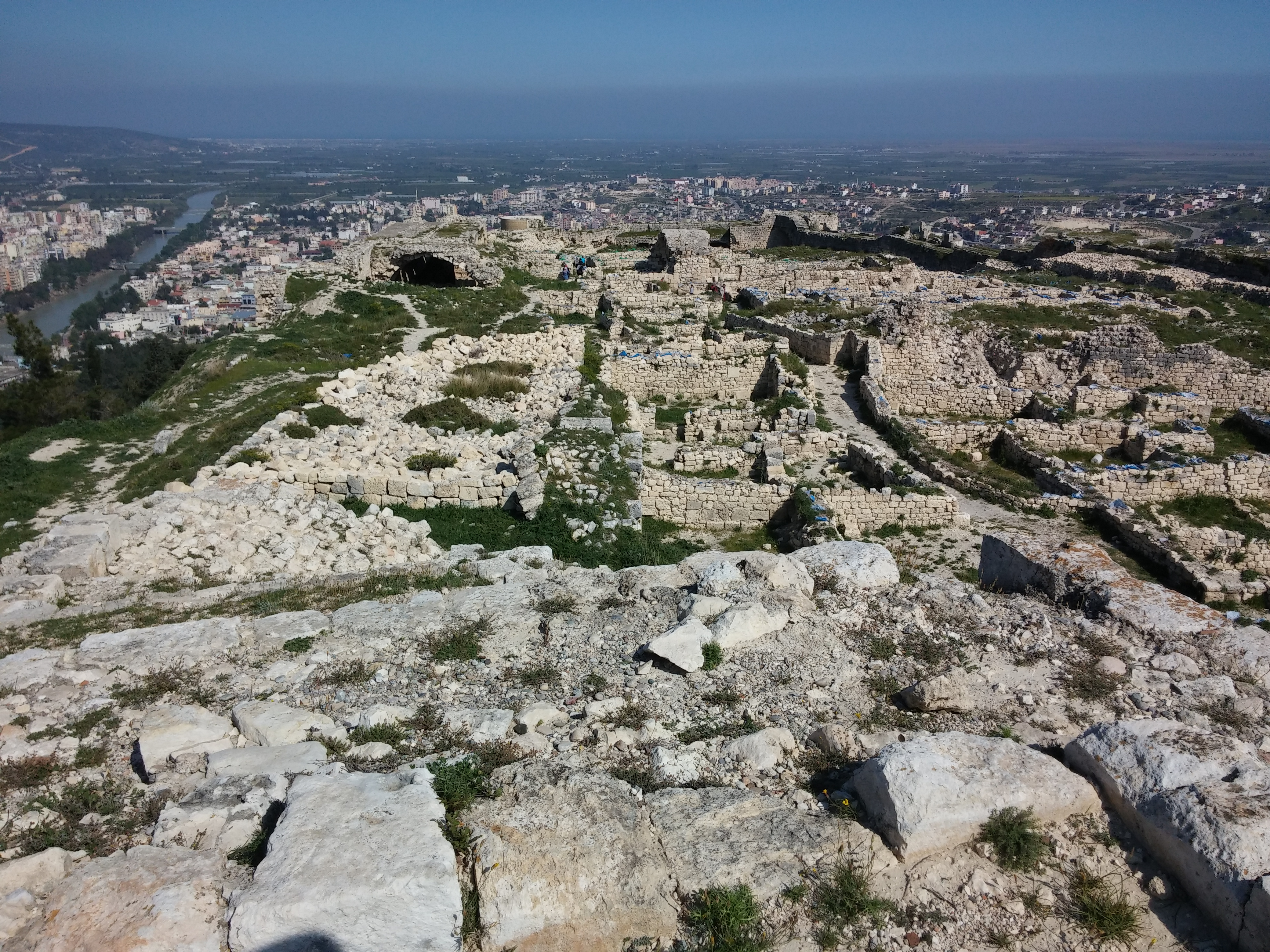 Silifke Kalesi'nin içerisinden görünüm.